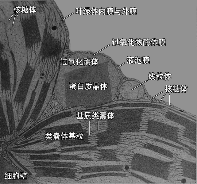 细胞中过氧化物酶体，叶绿体和线粒体的分布 dgg32 通过 Fireworks 制作，MIKE 依據原圖修改